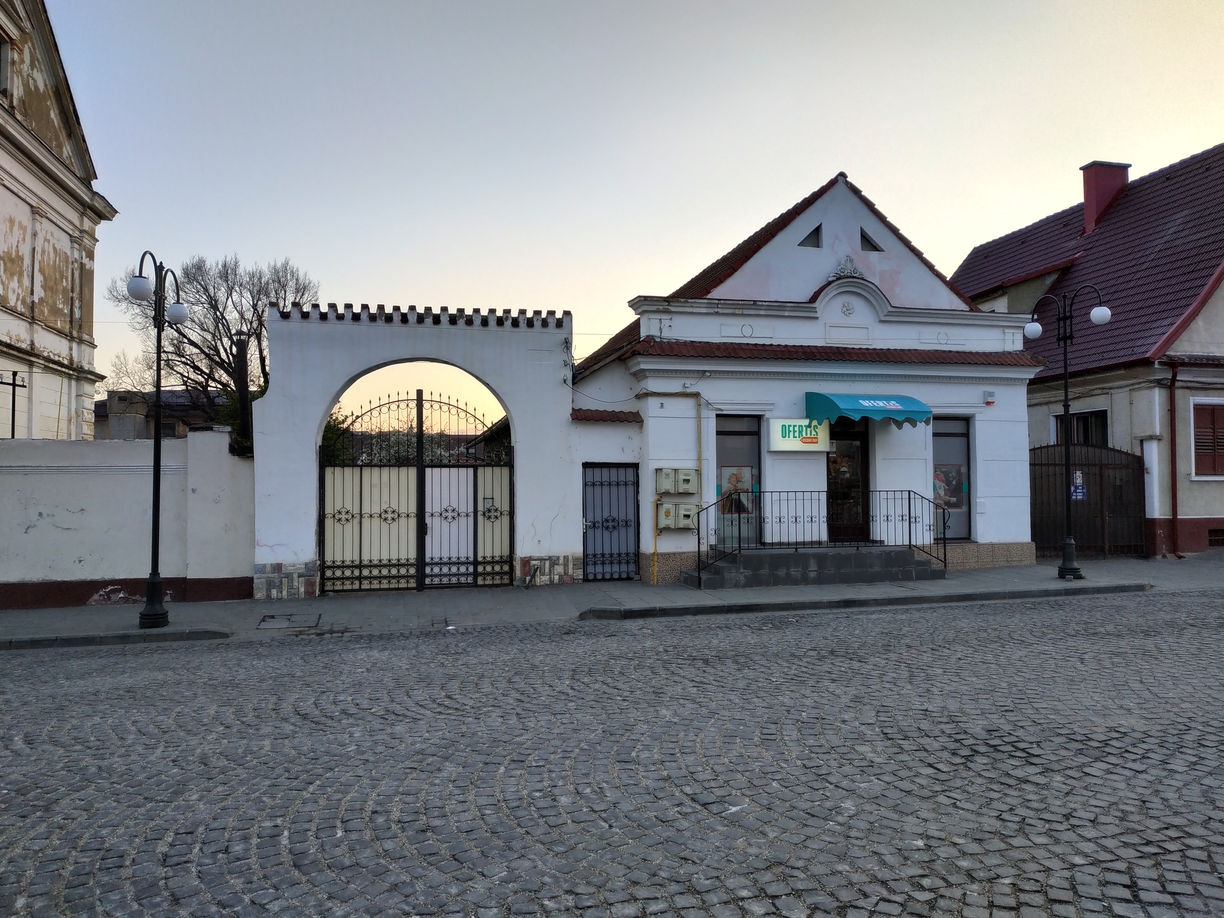 Casa de pe Str. Măgurii Nr. 3, Codlea, județul Brașov, România